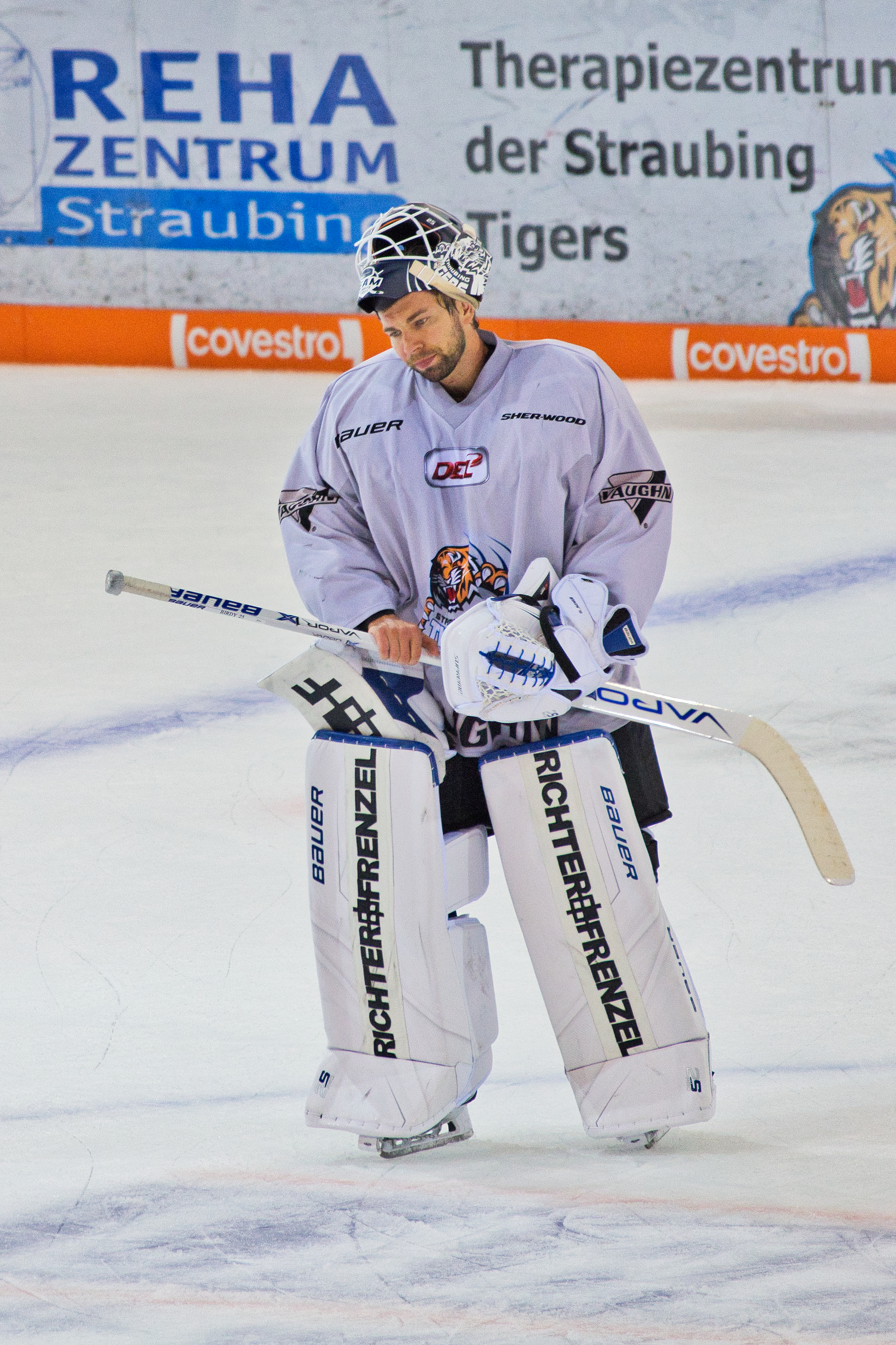 Sebastian Vogl beim öffentlichen Training am 4. August 2018.